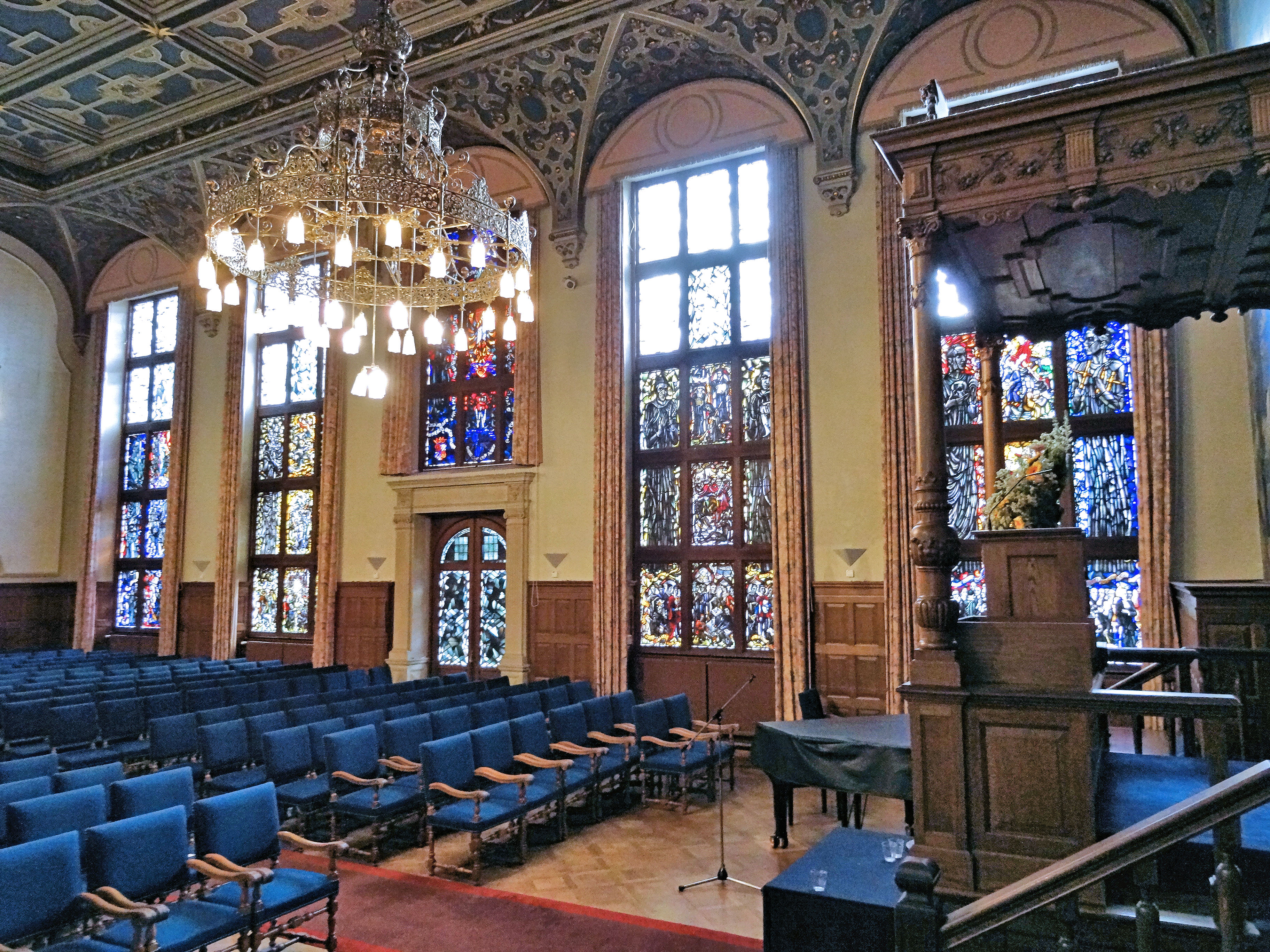 De vijf gedenkramen in de aula van het Academiegebouw in Groningen werden tussen 1937 en 1951 gemaakt door de kunstenaar Johan Dijkstra.